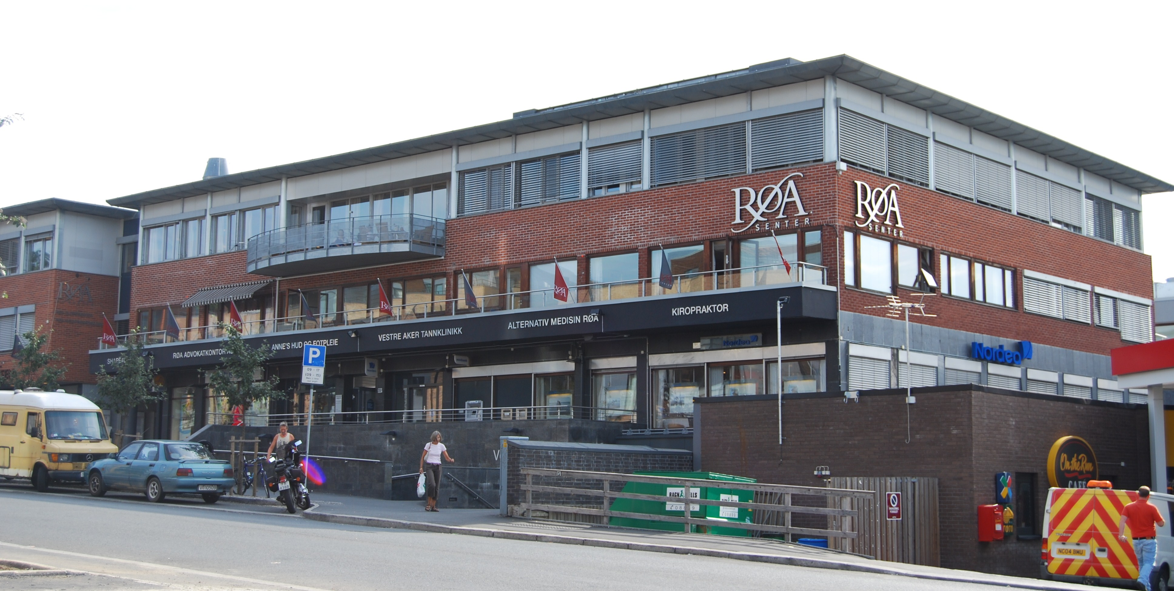 Røa senter